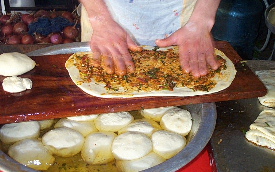 Plato marroquí 2